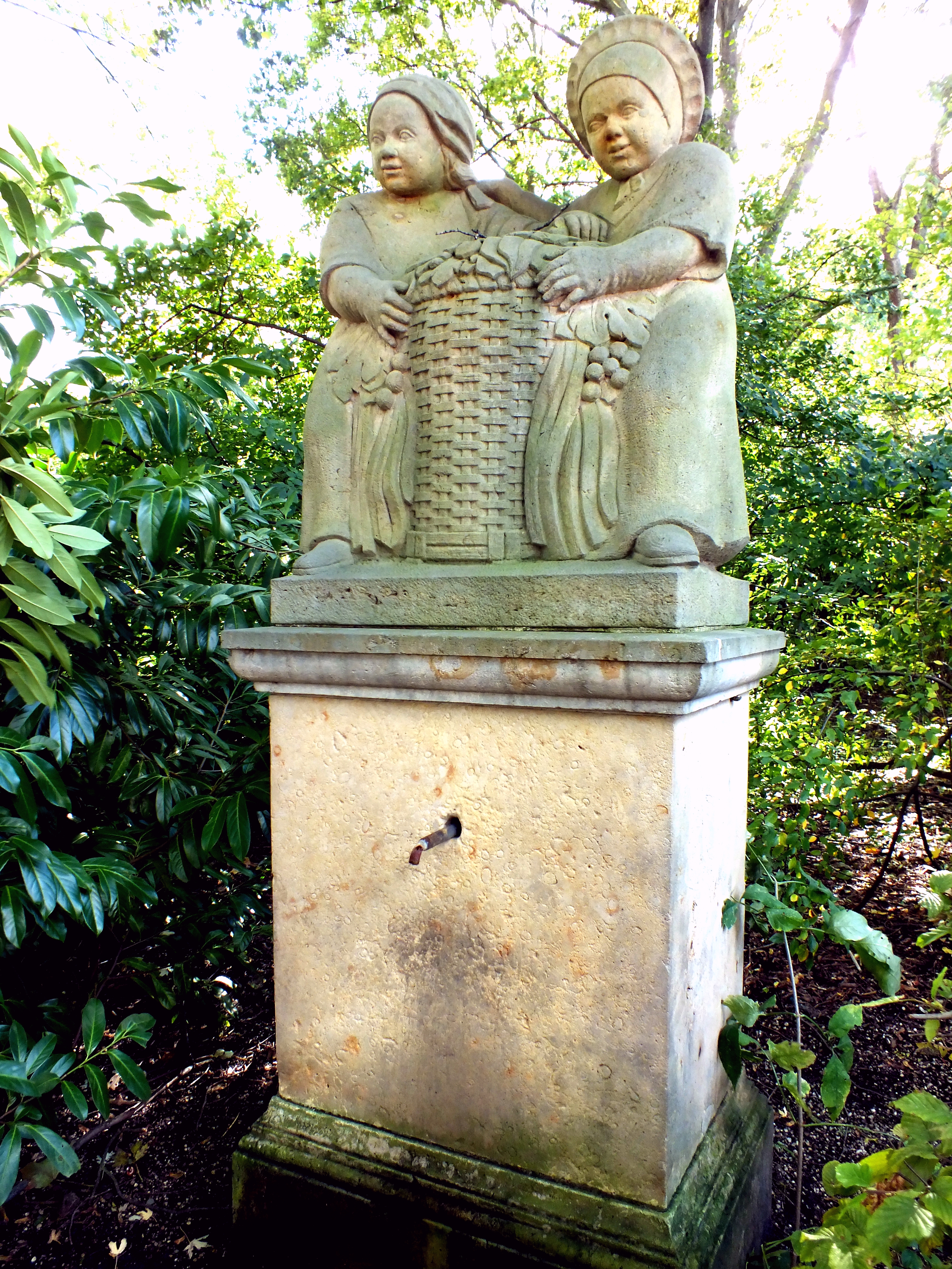 Volkspark F’hain, Am Rundbrunnen